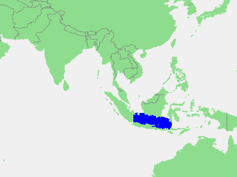 Java Sea